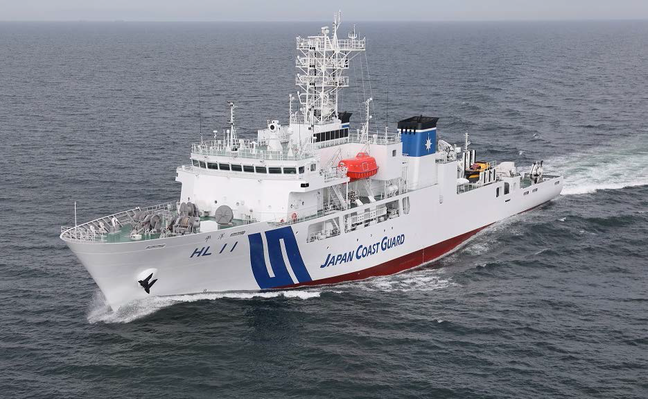 海上保安庁では、「海上保安体制強化に関する方針」（平成２８年１２月海上保安体制強化に関する関係閣僚会議決定）に基づき、海洋調査体制の強化を進めています。その一環として、令和２年１月２９日、海上保安庁最大となる測量船「平洋」が就役します。